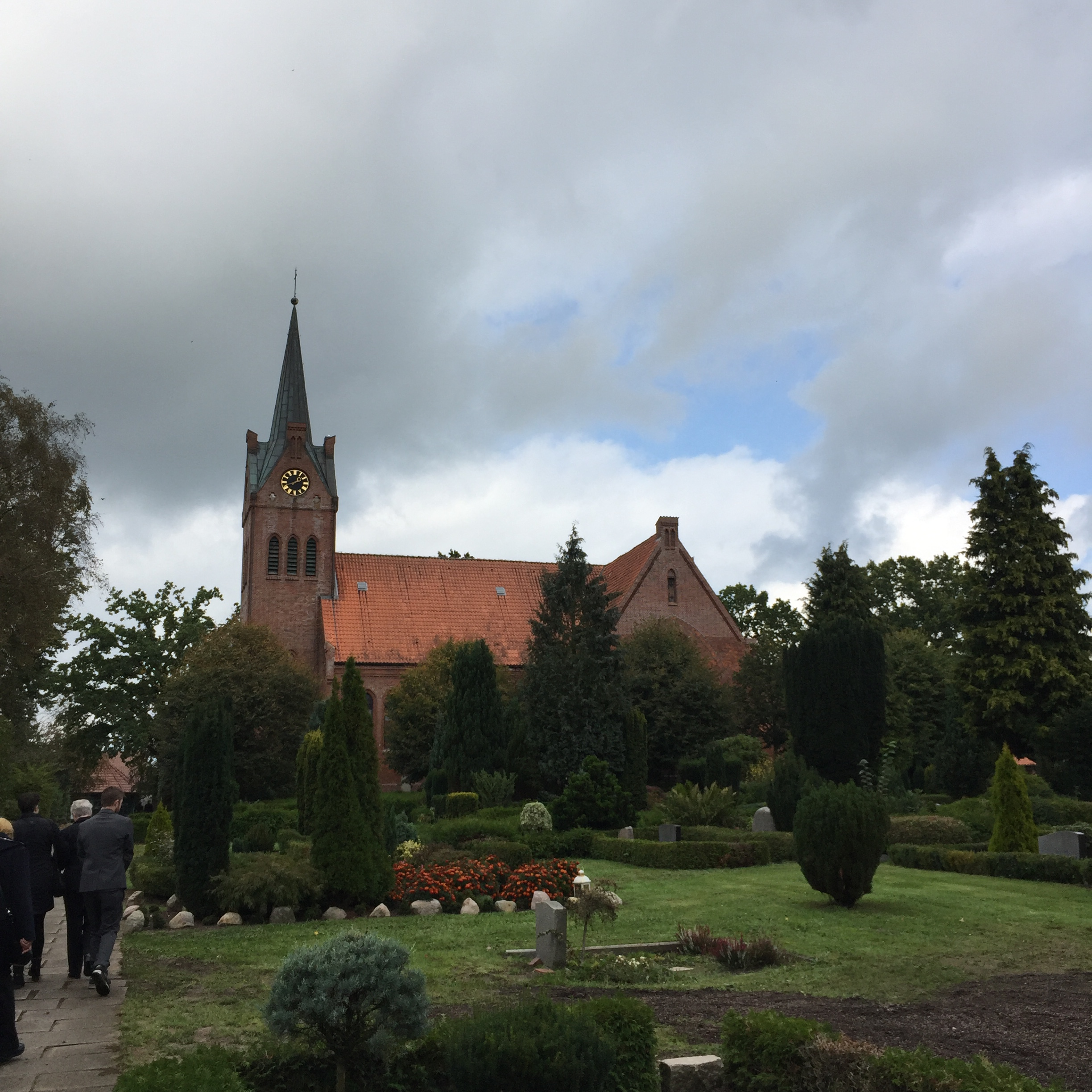 Todenbüttel, Kirche